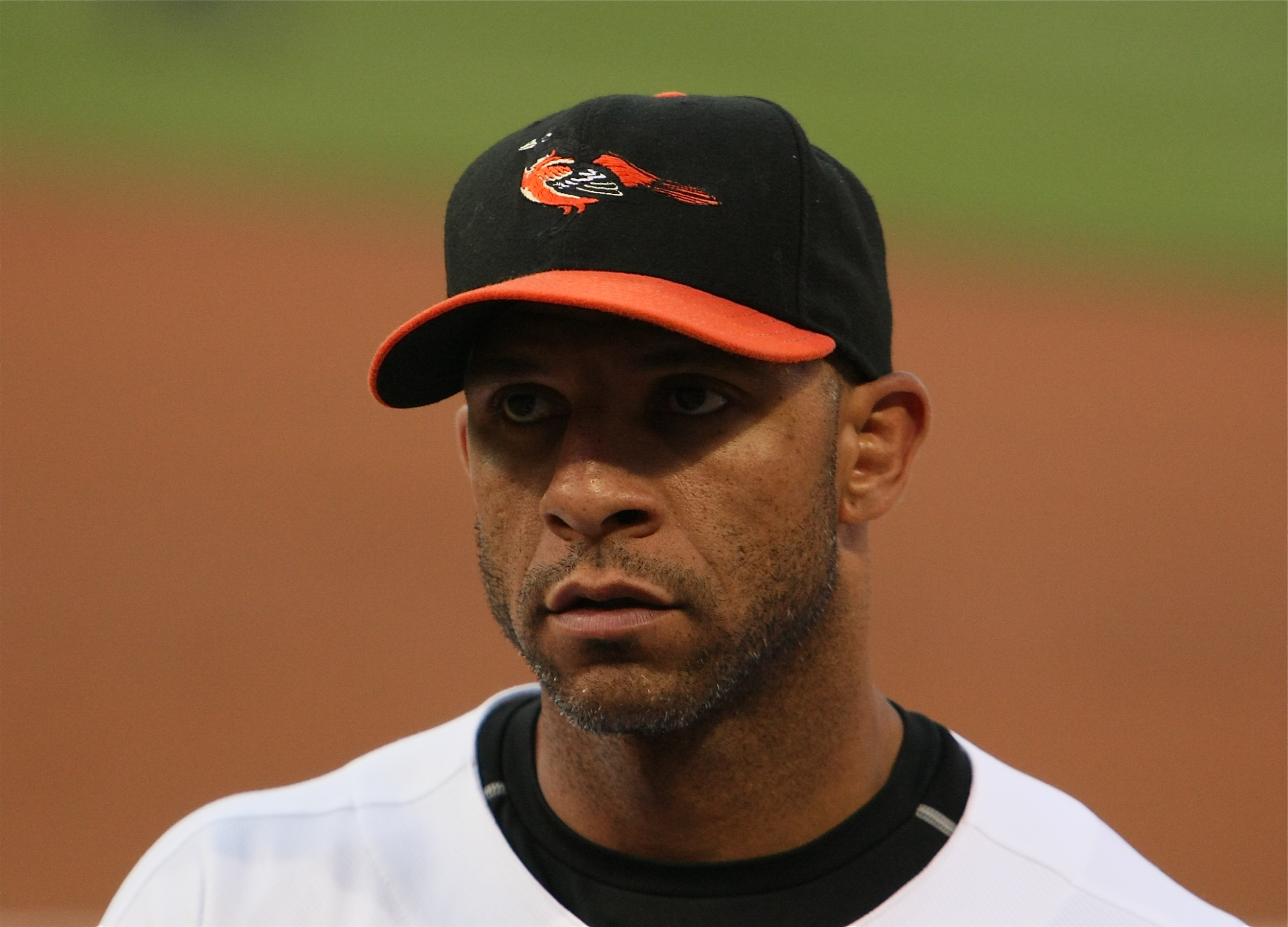 Jay Payton